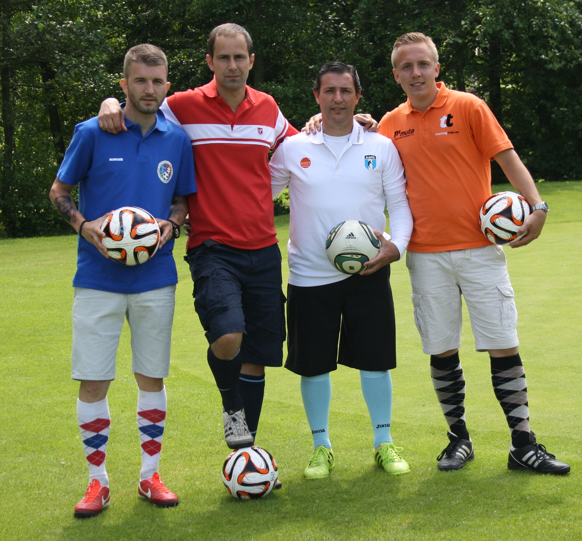 Capital Cup